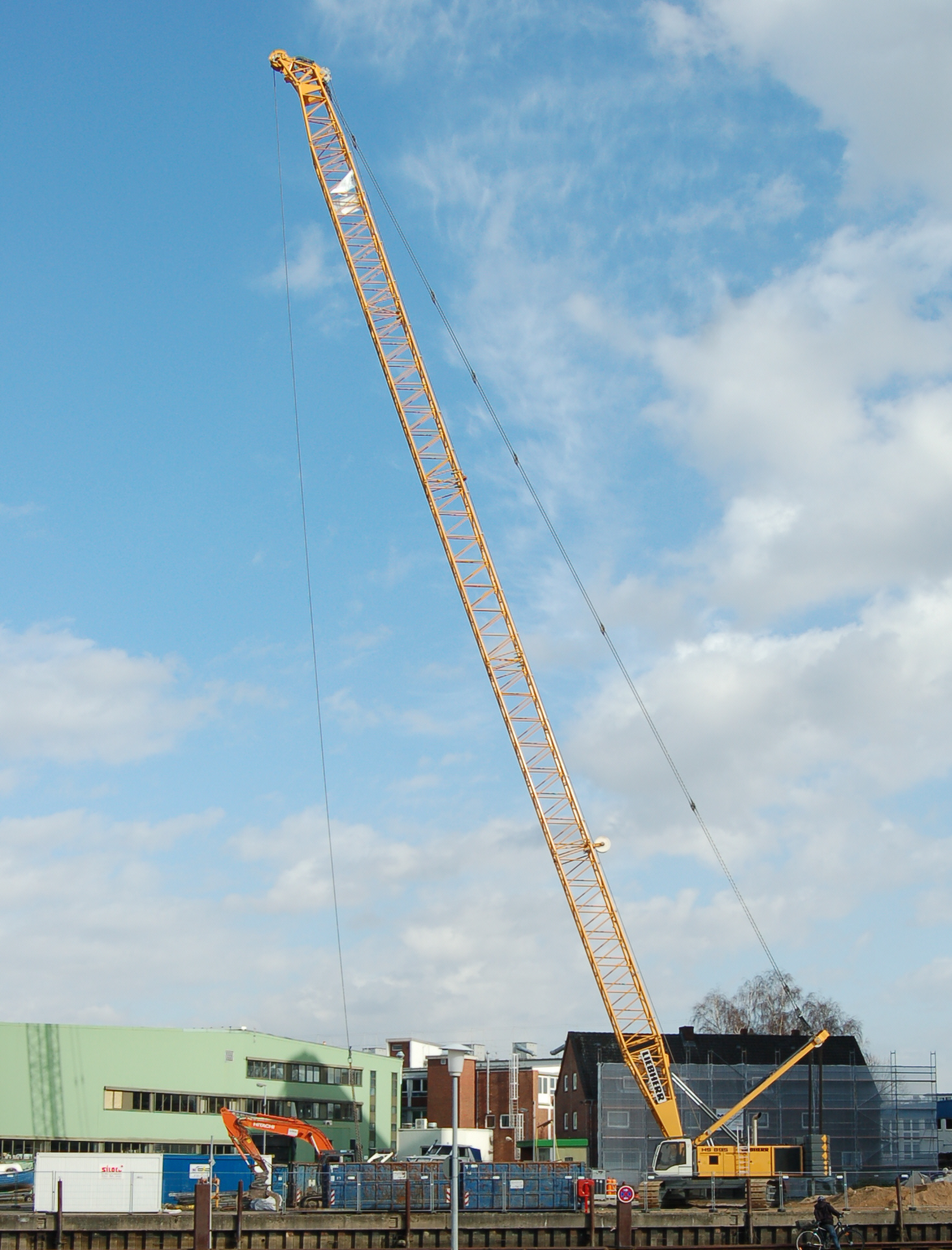 Hydroseilbagger Liebherr HS 895 in Uetersen ca 280 Tonnen Gesamtgewicht, Auslägerlänge 85 Meter .